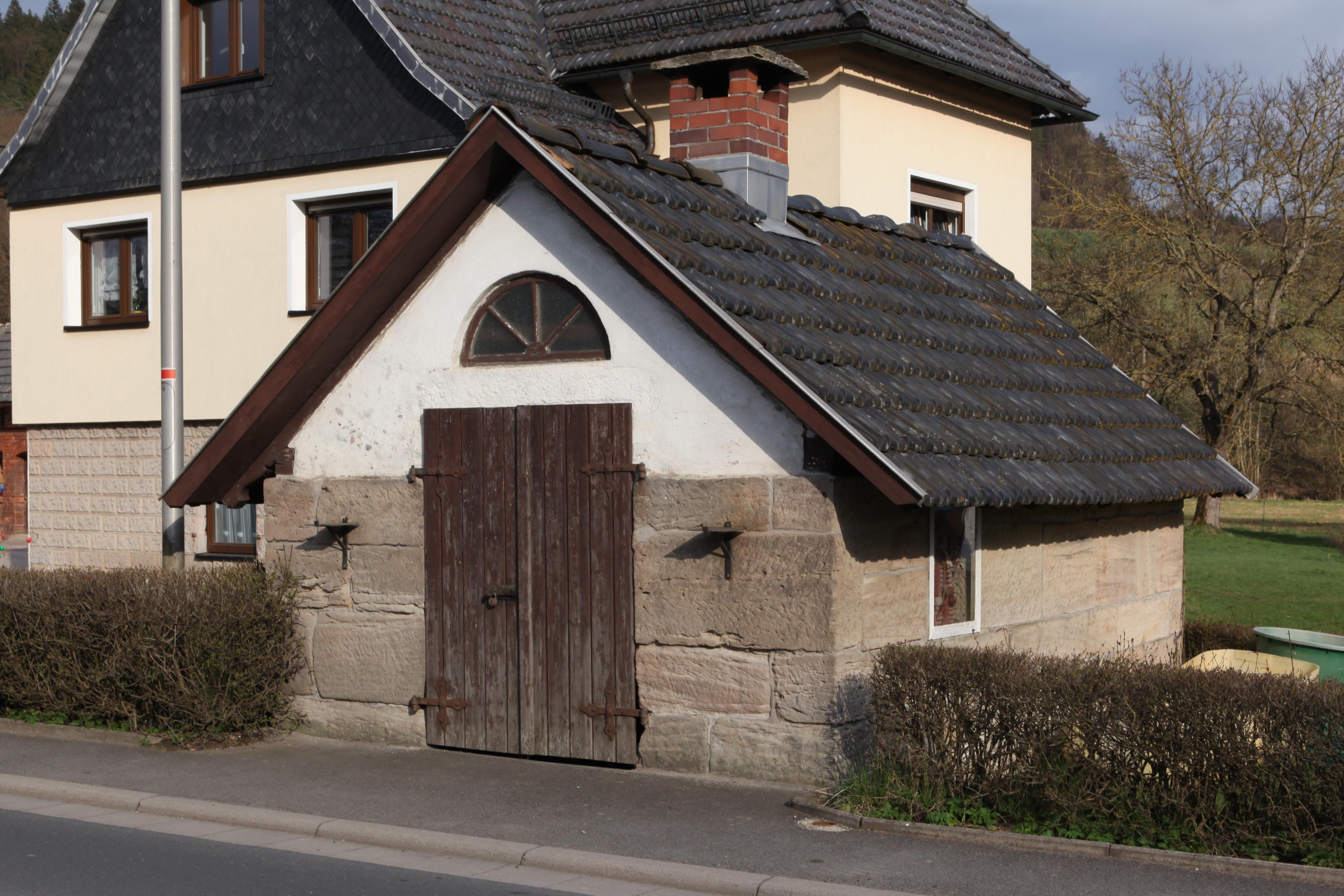 altes Backhaus in Grümpen (OT von Frankenblick) in Thüringen